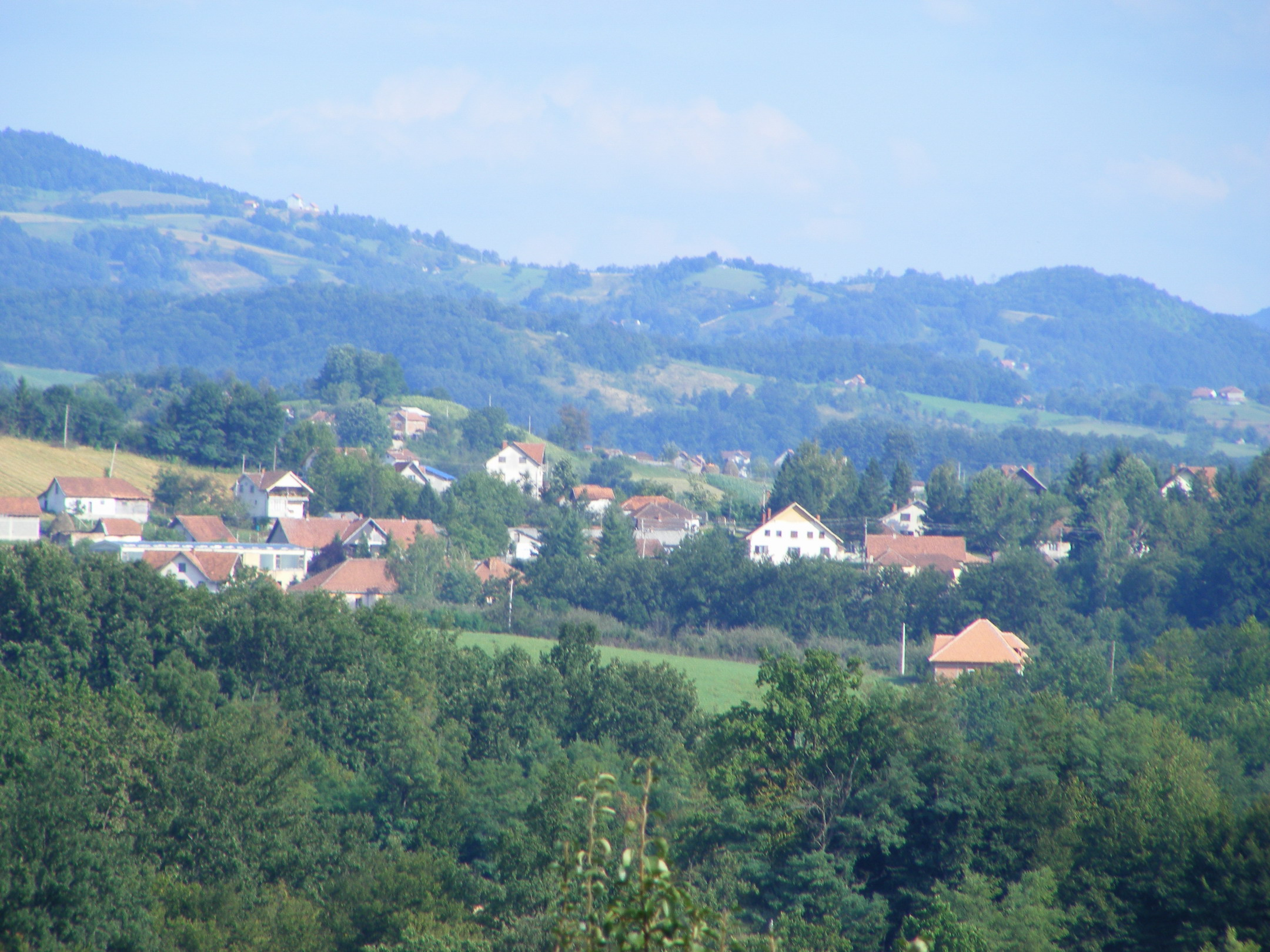 Fotografija je snimljena iz zaseoka Carevići-Goračići, udaljenog oko tri kilometra od centra sela.